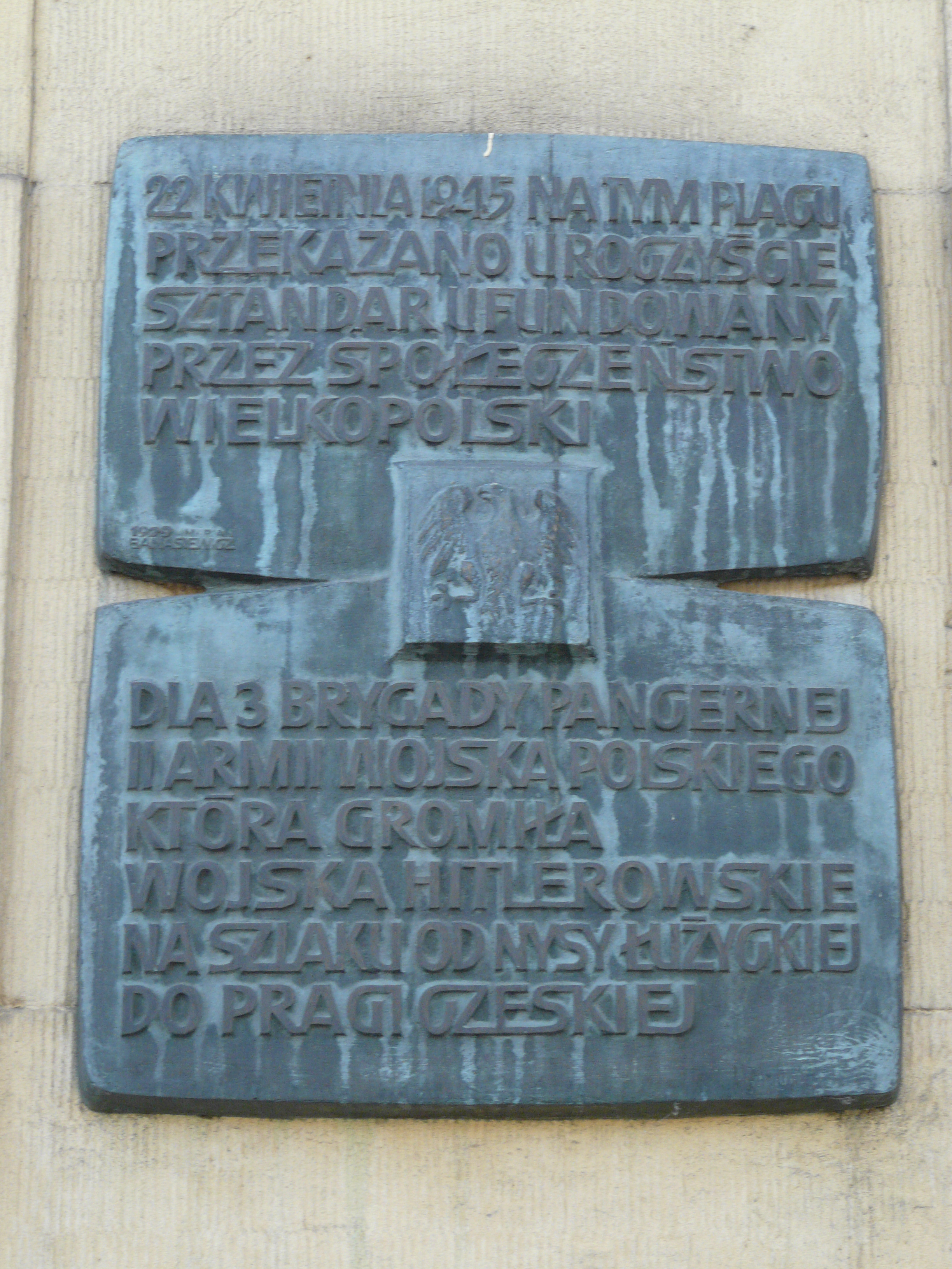 Poznań.